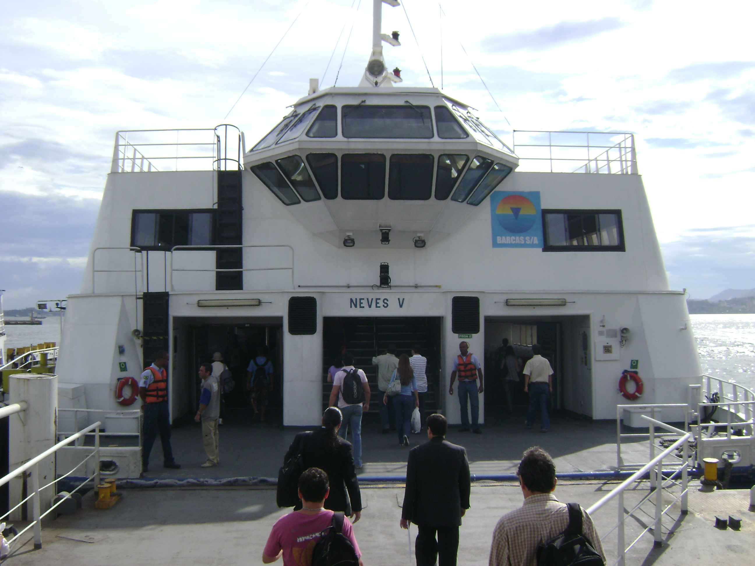 Barca na cidade do Rio de Janeiro, Brasil.